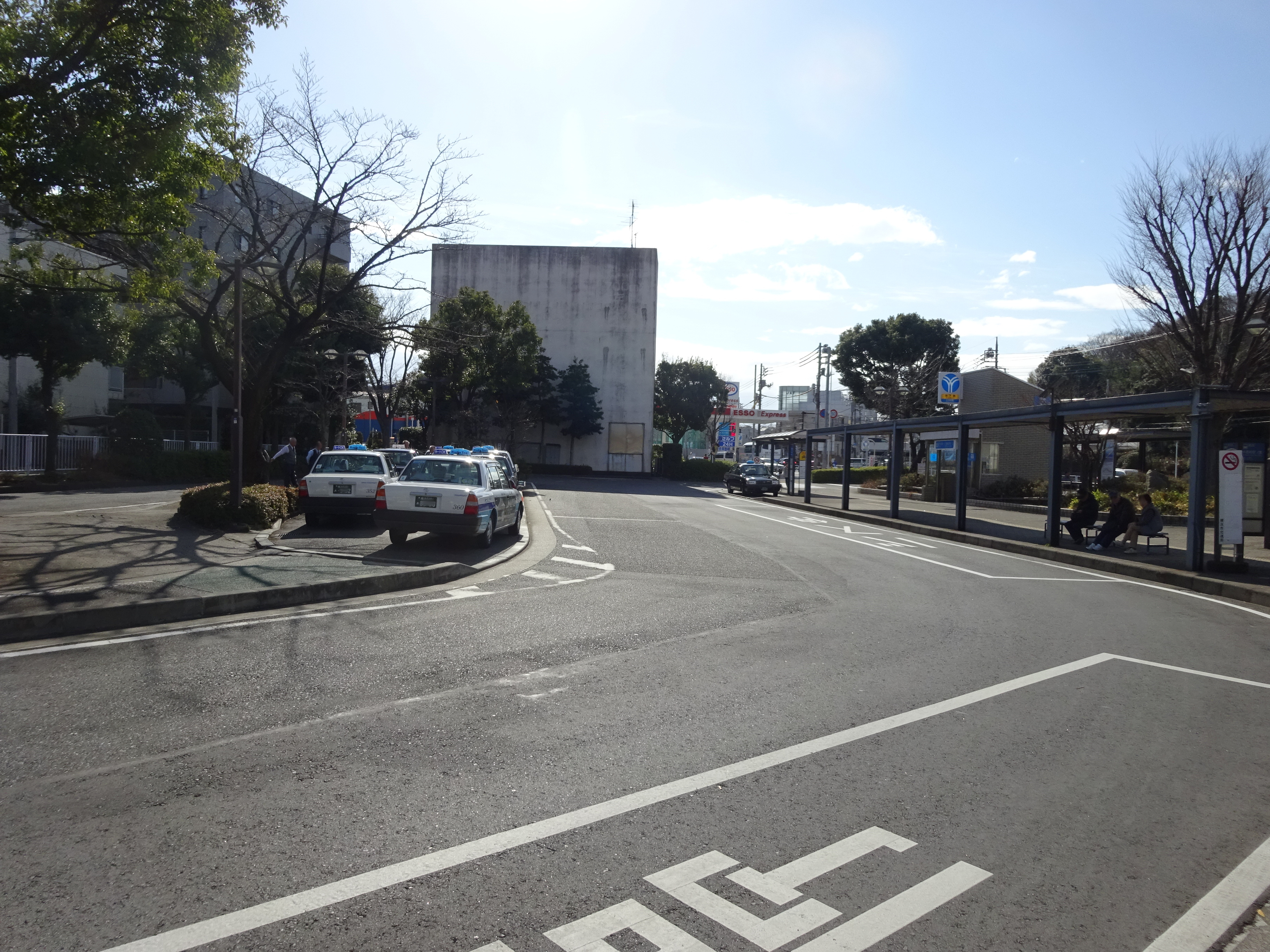 片倉町駅バスロータリー